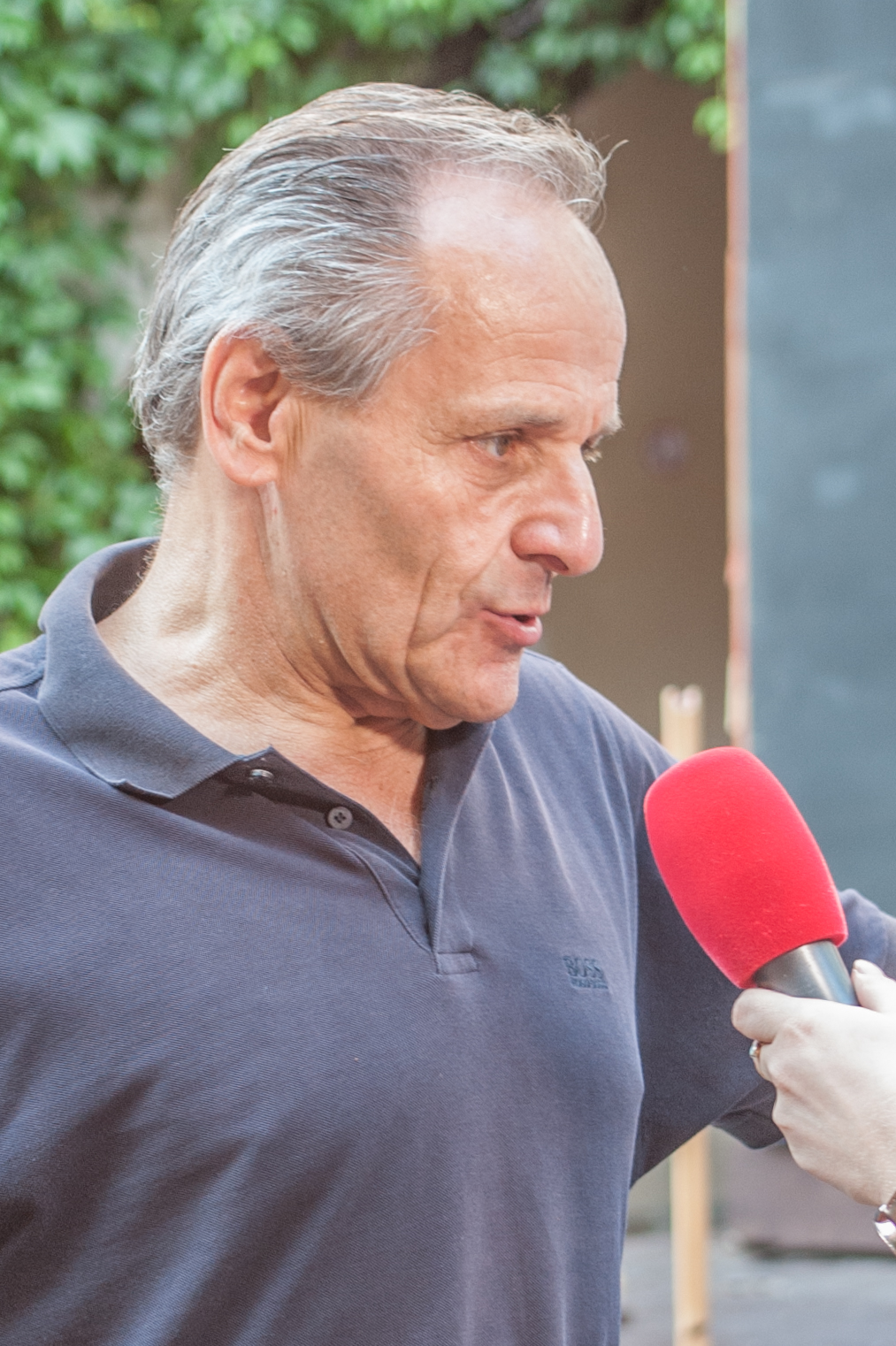 Wachaufestspiele Weißenkirchen: Premiere von „Der Brandner Kaspar und das ewig’ Leben“ am 19. Juli 2016 in Weißenkirchen. Bild zeigt Stephan Paryla-Raky.